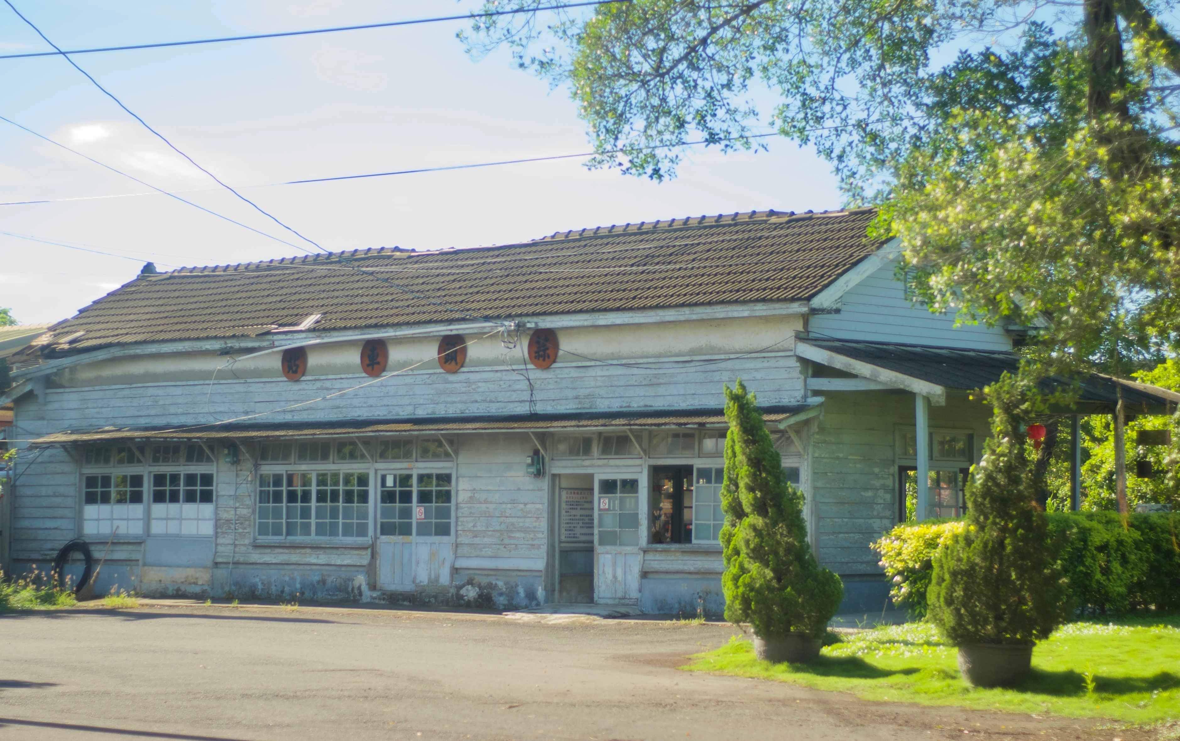 臺灣糖業鐵路蒜頭車站，位於蒜頭糖廠內。現為五分車之旅使用之車站，嘉義縣政府核定為縣定古蹟。